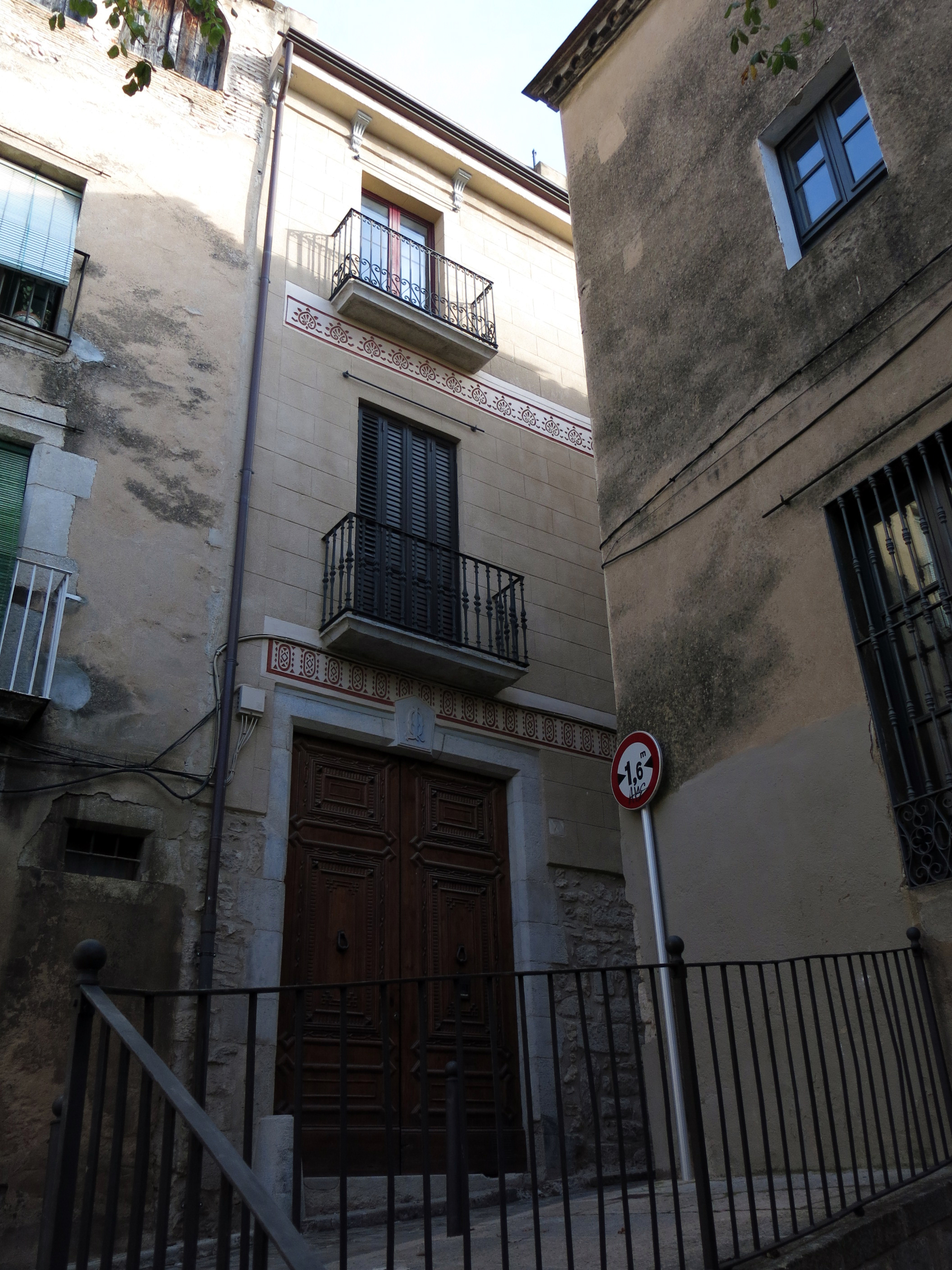 Habitatge a la travessia del Portal Nou, 7 (Girona)